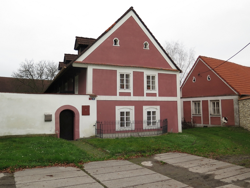 Usedlost čp. 1, Honice 1, Honice.